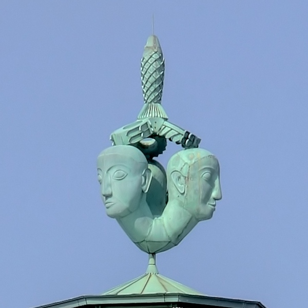 Skulptur auf dem Messeturm Köln, Teil der Rheinhallen. 3 Köpfe. Das Zahnrad (hinten) symbolisiert die Industrie, der Lorbeerkranz (links) die Kunst und der Flügel (rechts) den Handel in Form des Götterboten Hermes und der Fisch den Rhein This is a photograph of an architectural monument.